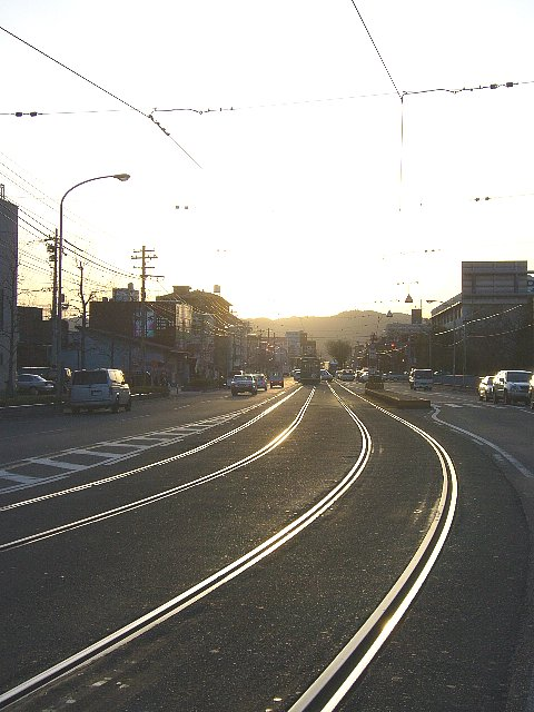 京福電気鉄道（嵐電） 西大路三条駅（撮影当時は三条口駅） 四条大宮方面のりば（安全地帯） 西大路三条交差点から西望 2006年3月 Bakkai撮影